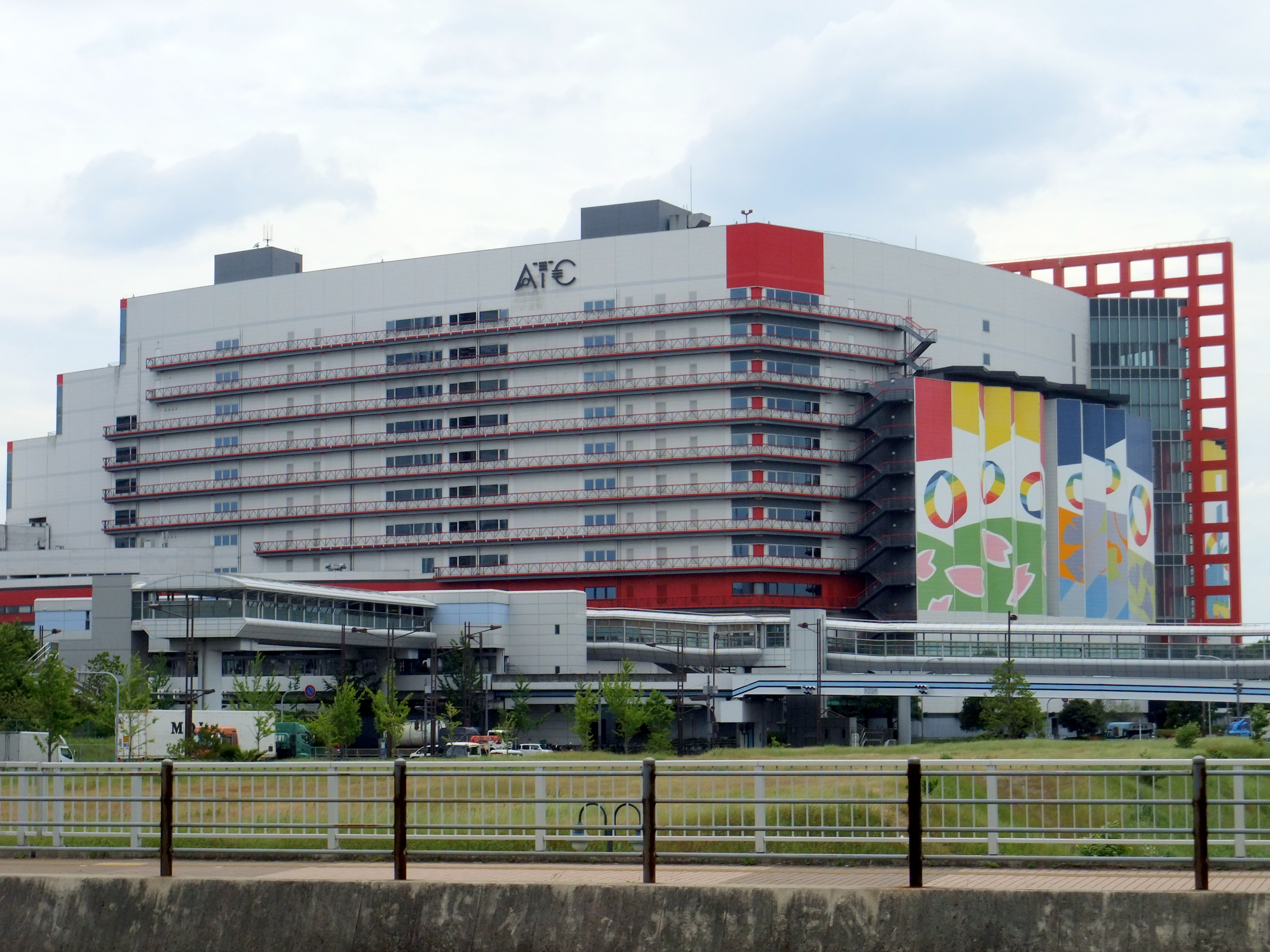 アジア太平洋トレードセンターITM棟